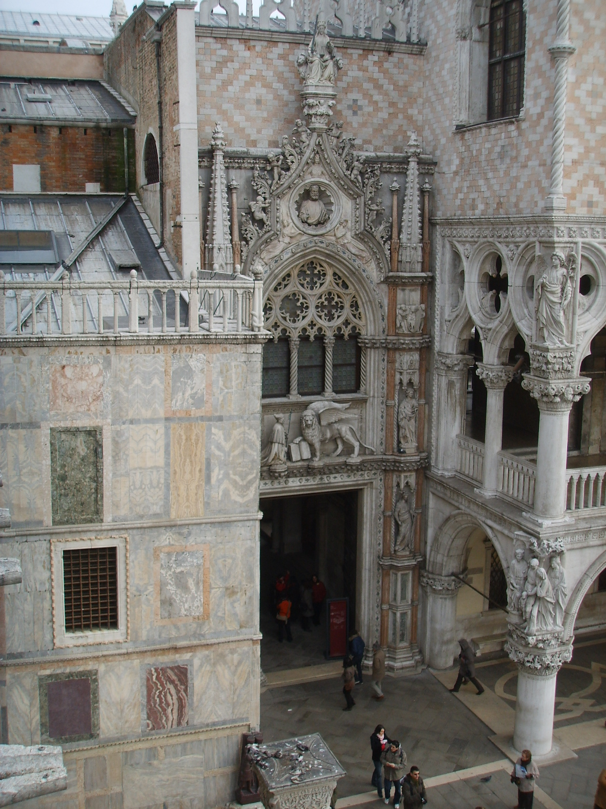 Porta della Carta di Palazzo Ducale a Venezia.